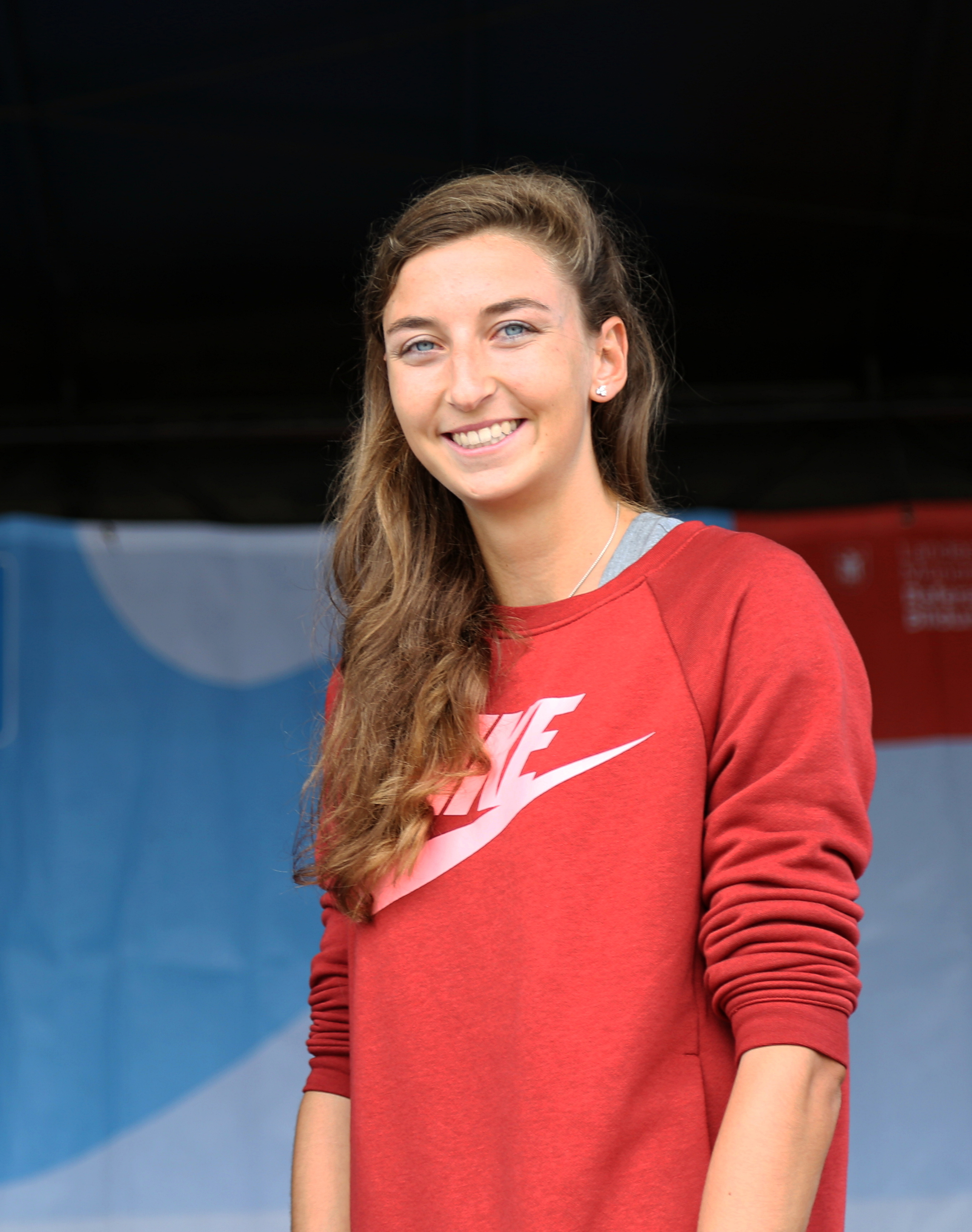 Christina Hering auf dem Sportfest München 2017